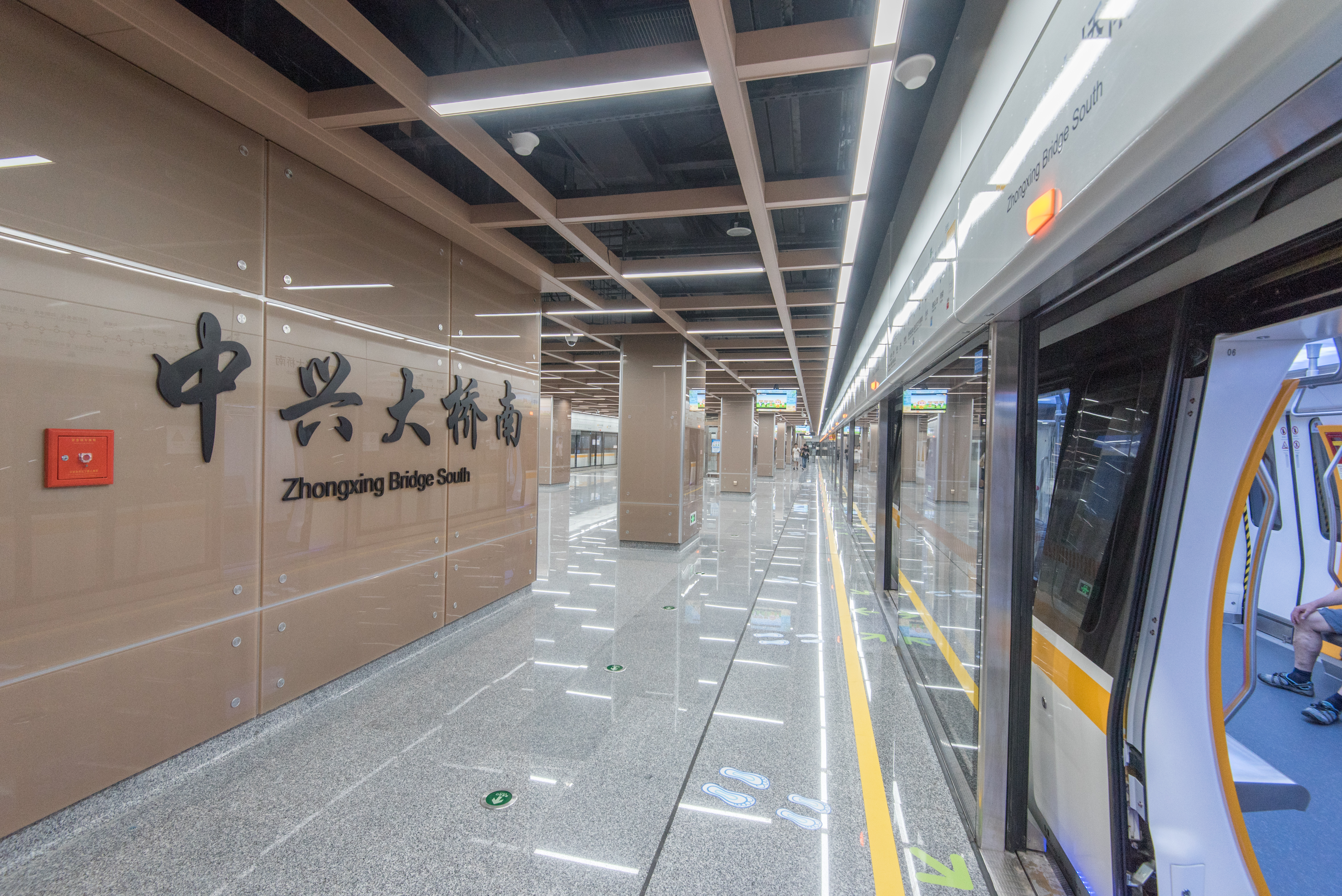 中兴大桥南站大字壁